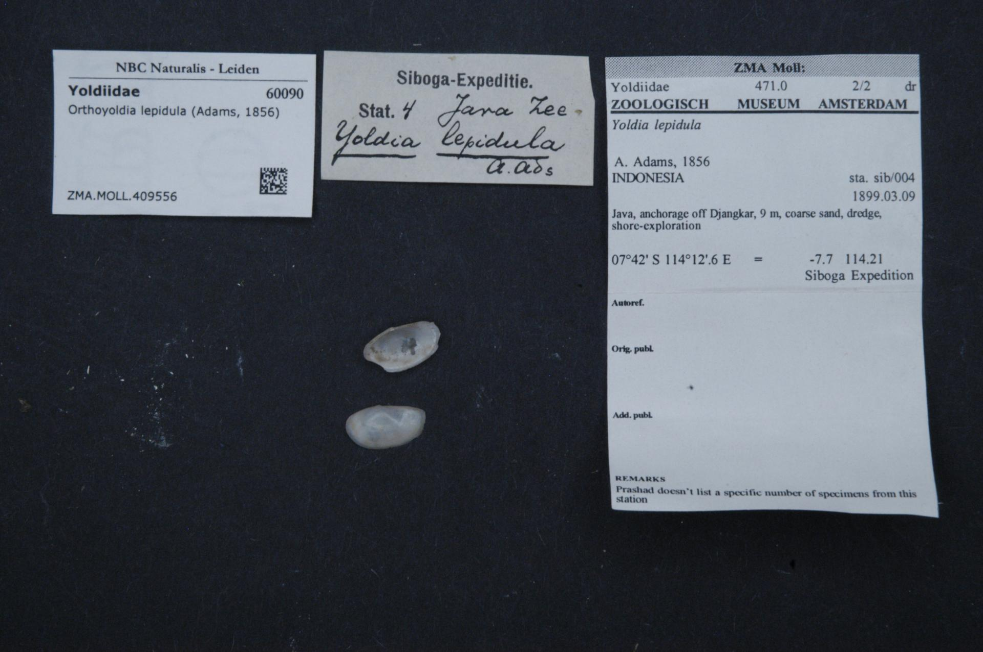 Orthoyoldia lepidula (Adams, 1856)